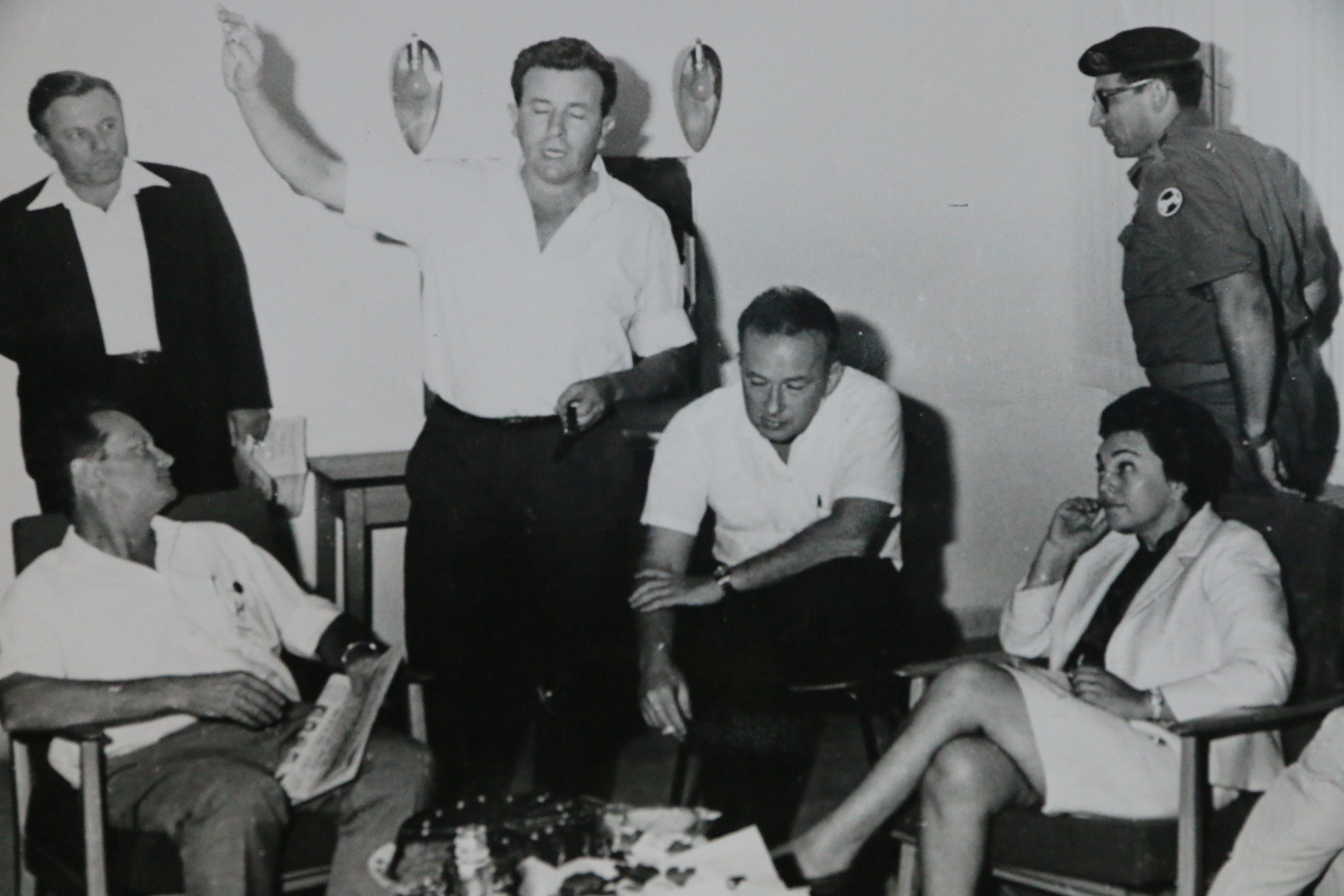 הכנות לטקס 20 שנה לחטיבת הראל עם מארגן הטקס יהודה אילן, ראש עיריית ירושלים טדי קולק, שר החינוך יגאל אלון, אלוף פיקוד רחבעם זאבי ויצחק רבין. צולם בשנת 1968